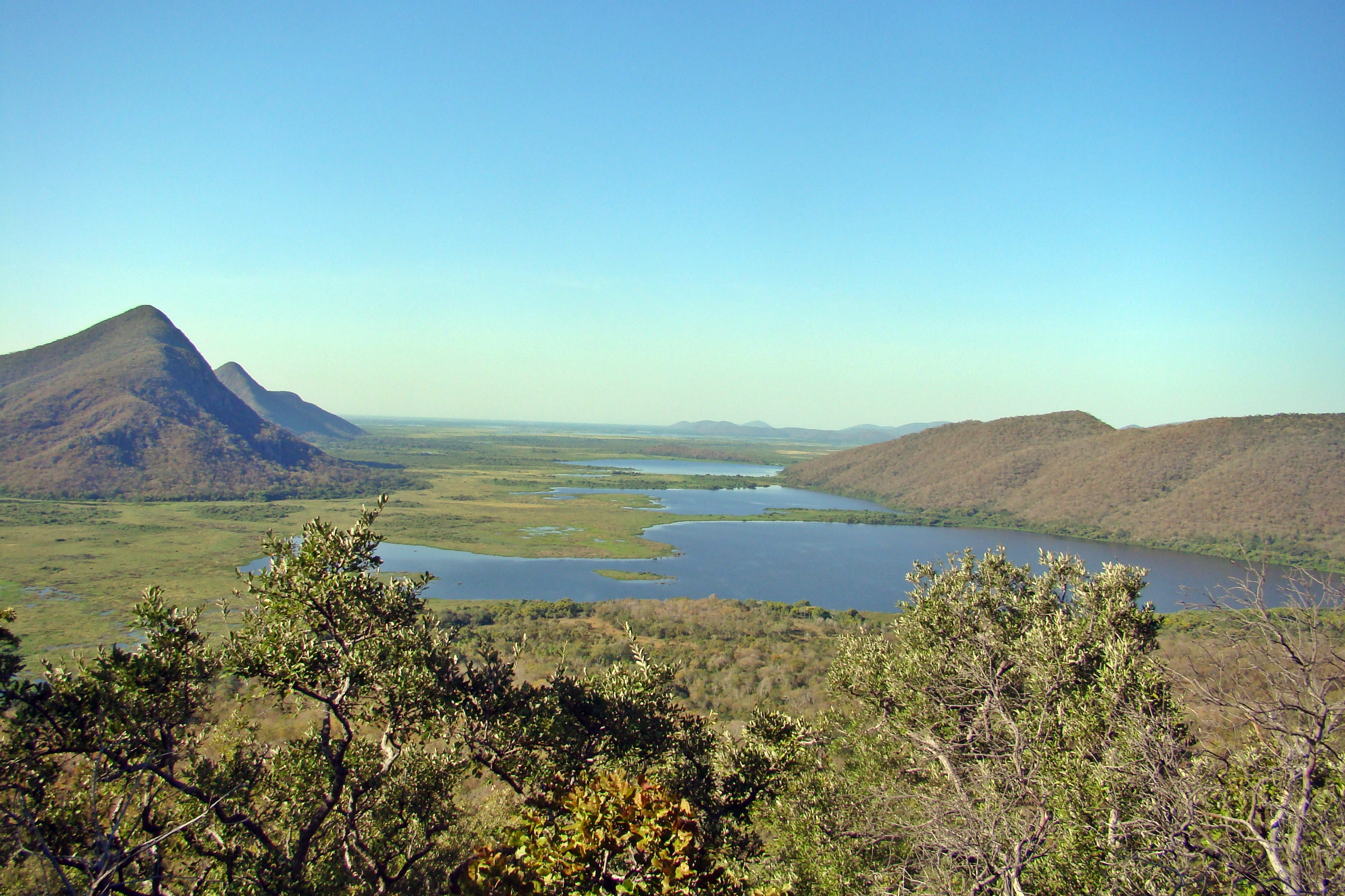 Serra do Amolar